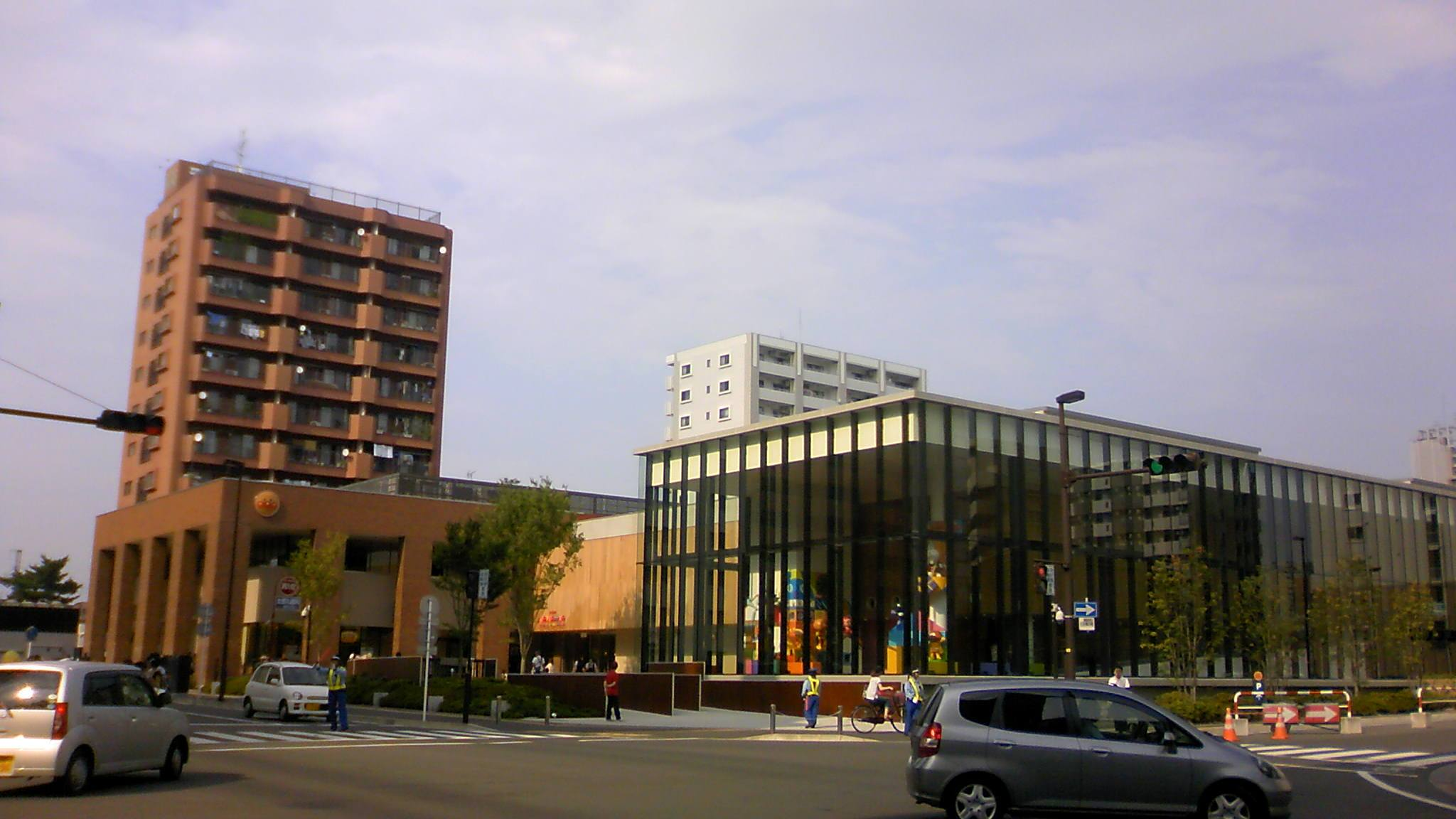 仙台アンパンマンこどもミュージアム&モール